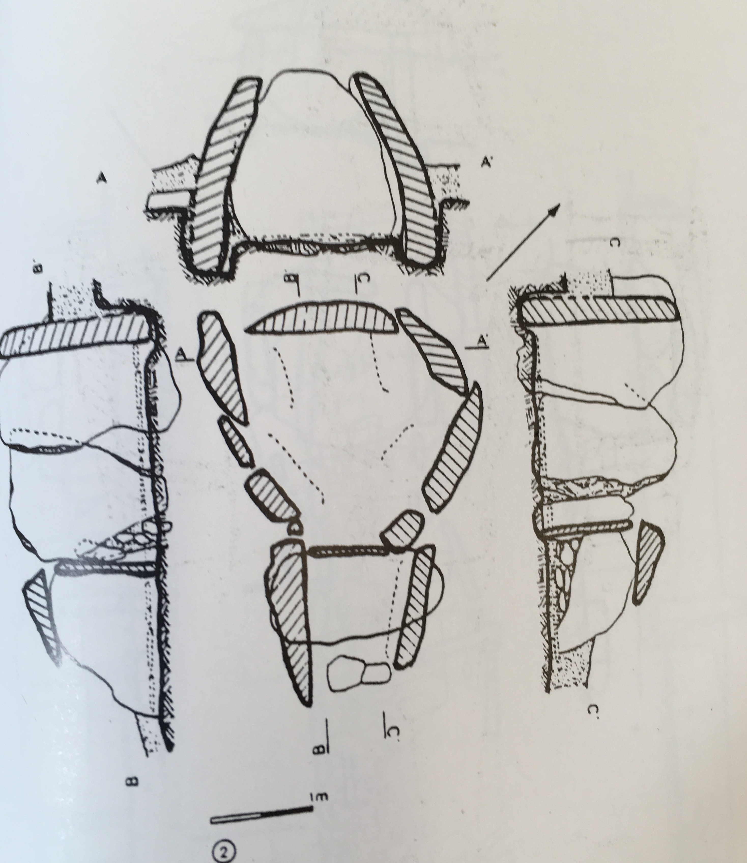 Monument megalític de sepulcres amb càmera subcircular.